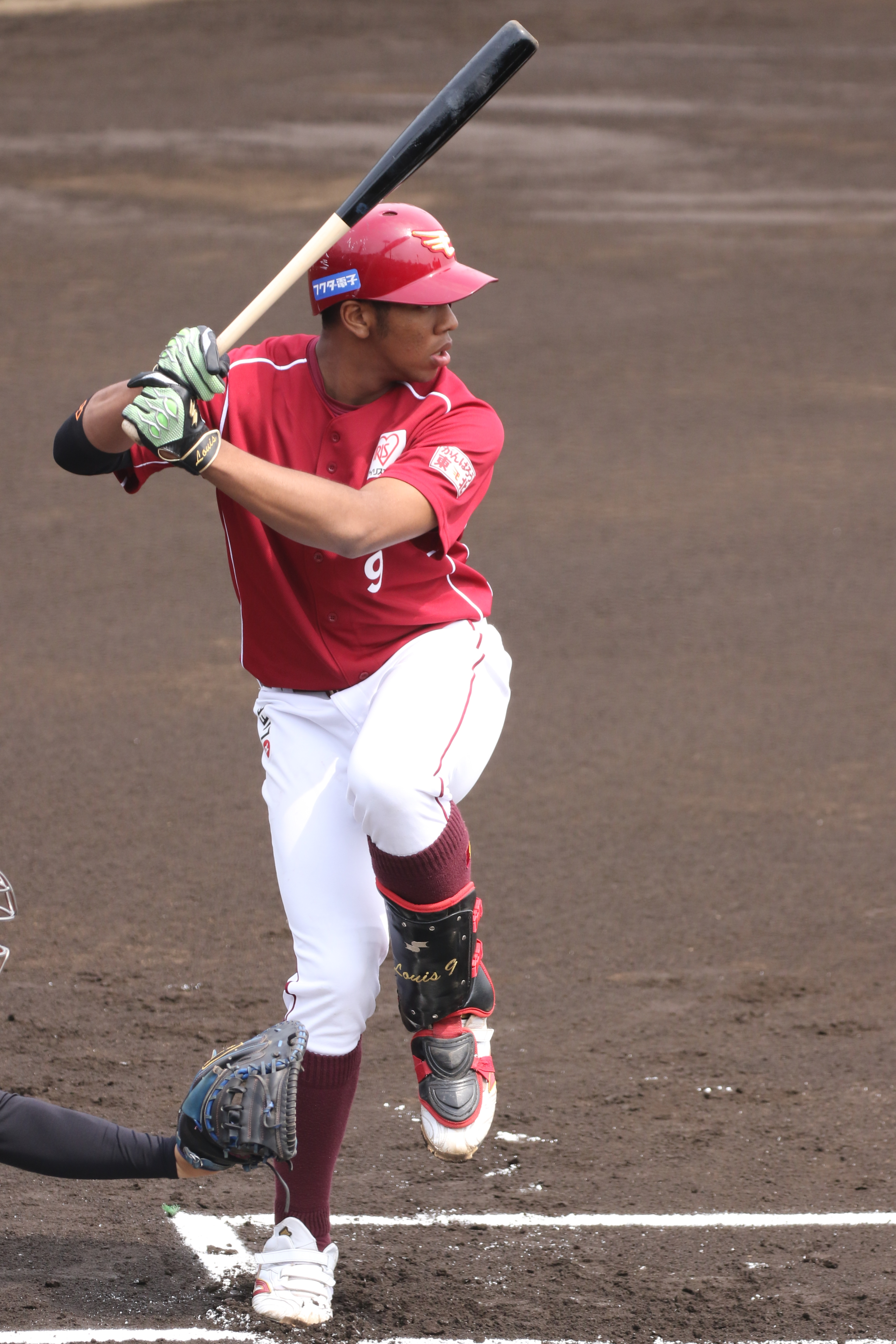 楽天オコエ選手